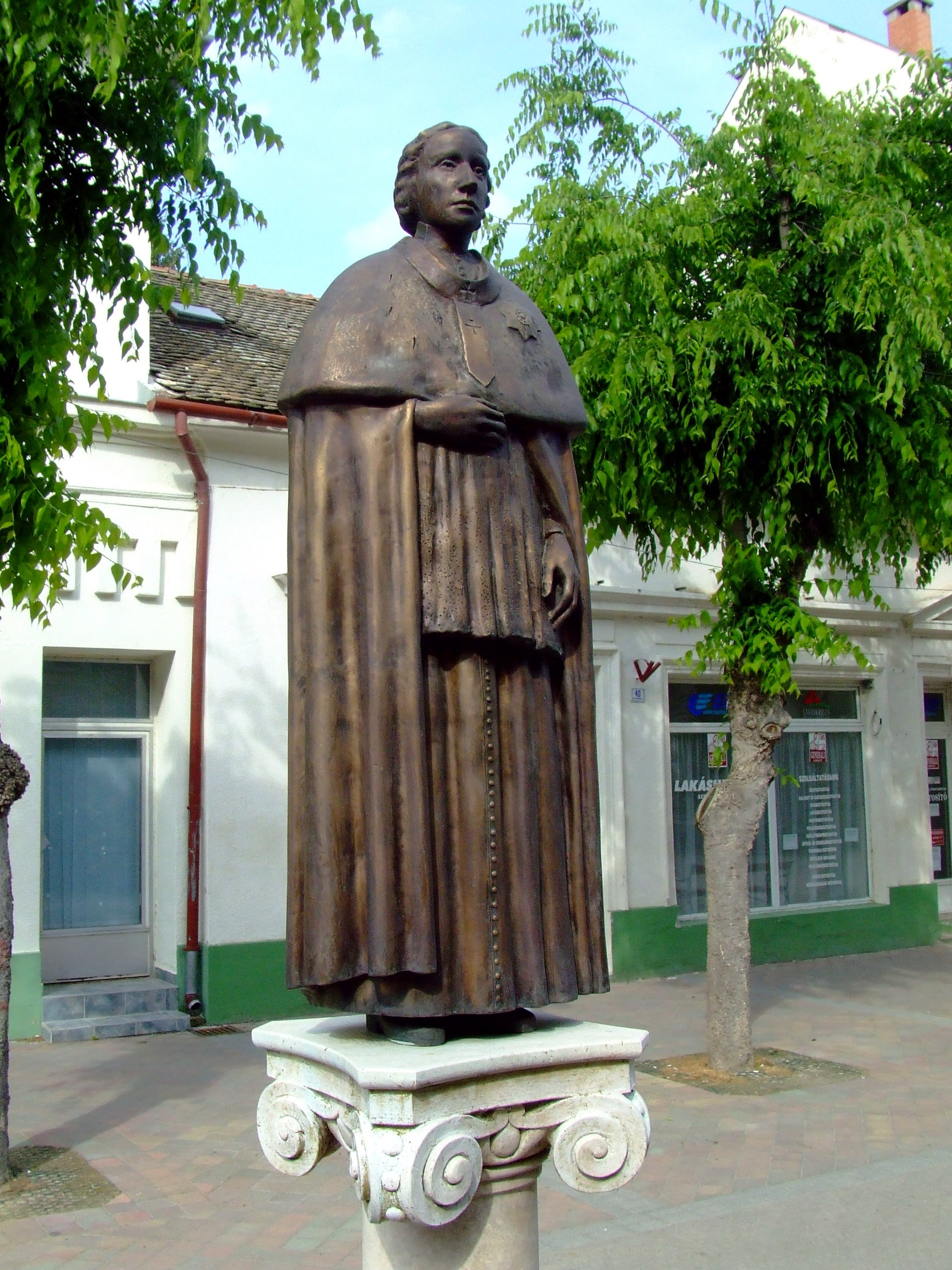 gróf Batthyány József (1727–1799) kalocsai érsek, majd bíboros, esztergomi érsek szobra Kalocsán. Székó Gábor alkotása(2000).